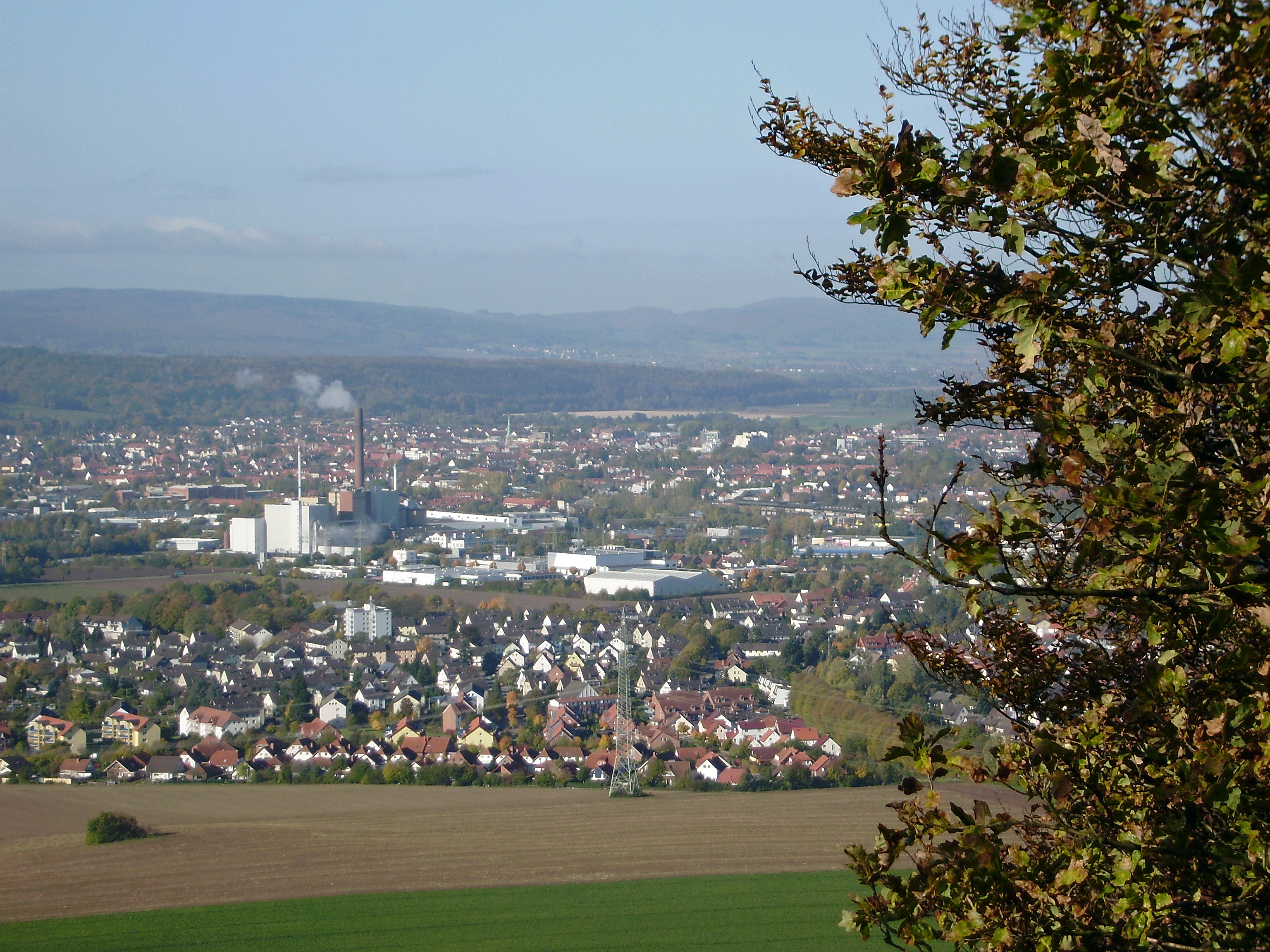 Afferde (vorne) vom Berg „Hohe Stolle“ gesehen. Im Hintergrund ist das Heizkraftwerk und die Stadt Hameln zu sehen.